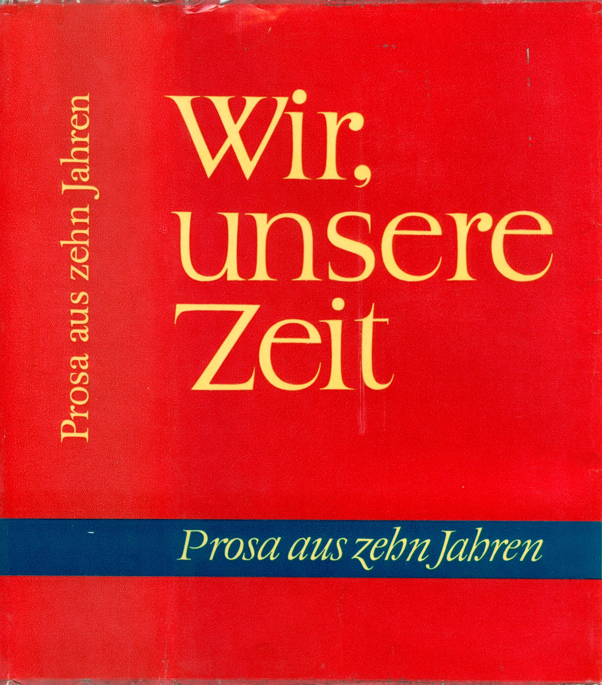 Buch "Wir, unsere Zeit" Prosa aus zehn Jahren Herausgegeben von von Christa und Gerhard Wolf EVP 8,70 DM